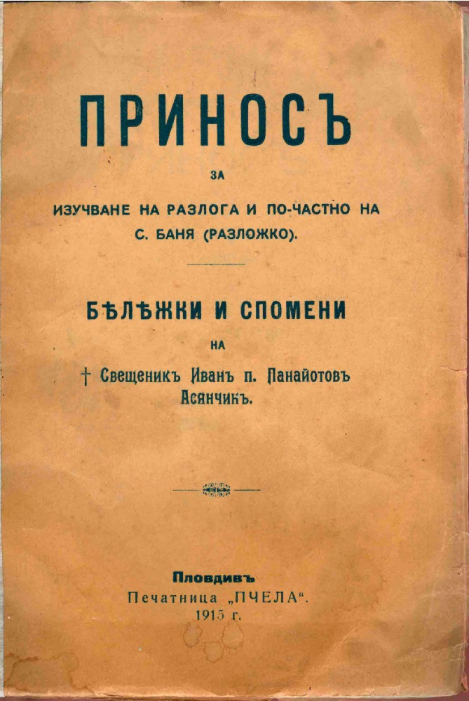 Приносъ за изучване на Разлога